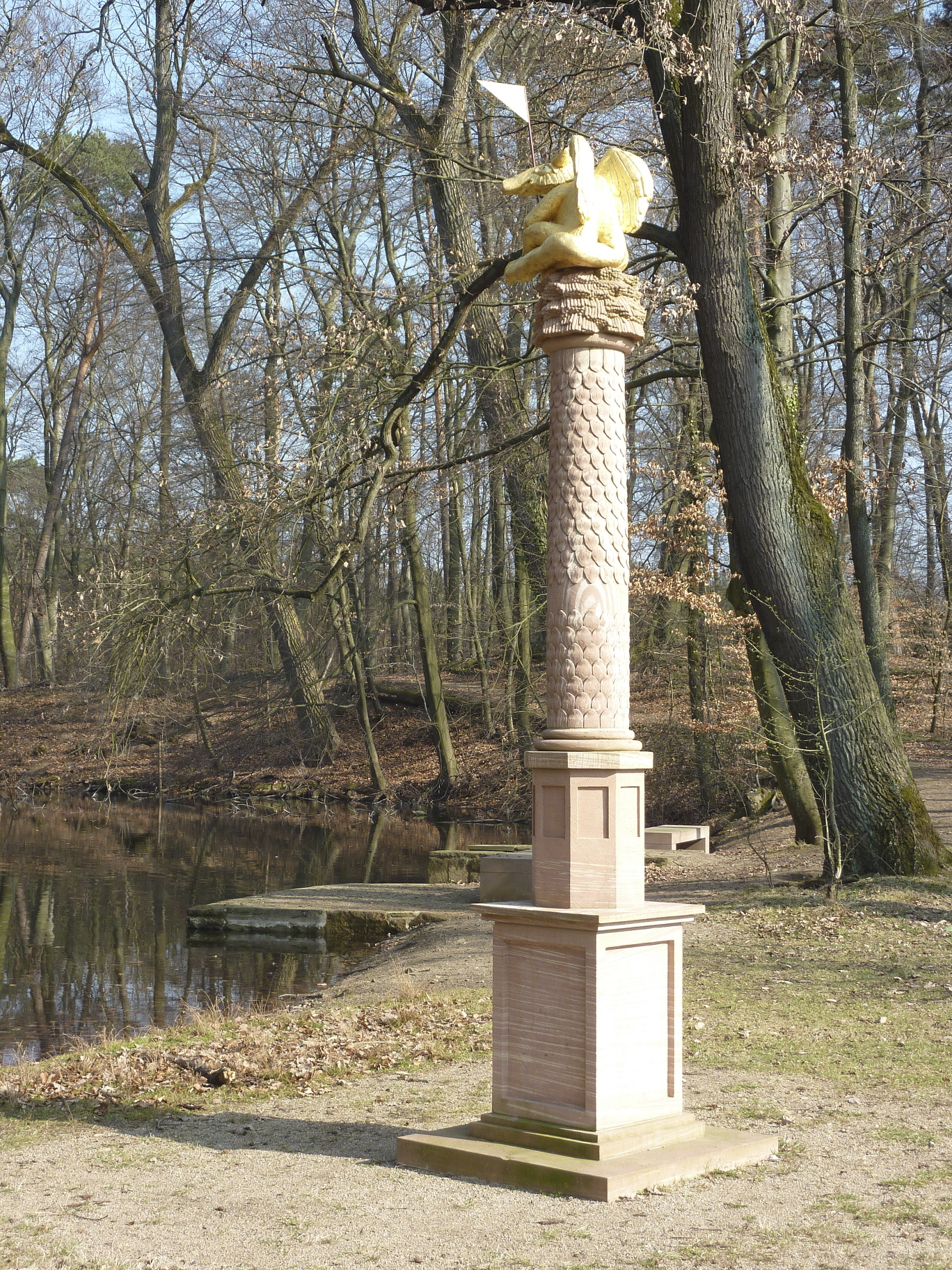 Der Tiroler Weiher ist ein Teich auf dem Gebiet der hessischen Stadt Frankfurt am Main. Das Stillgewässer liegt südlich des Flusses Main im Frankfurter Stadtwald. Der Tiroler Weiher gehört zum Stadtteil Sachsenhausen und befindet sich nahe der Stadtteilgrenze zum westlich davon gelegenen Frankfurt-Niederrad. Er wurde Ende der 1950er-Jahre künstlich angelegt, um den Grundwasserspiegel im Stadtwald zu regulieren. Das Foto zeigt die einer römischen Jupitersäule nachempfundene Skulptur am Ufer. Die Skulptur von Bildhauer Andreas Rohrbach besteht aus einer Säule aus rotem Sandstein sowie einer darauf sitzenden vergoldeten Figur. Die Figur stellt das vom Frankfurter Zeichner und Autor Robert Gernhardt entworfene Frankfurter Grüngürteltier dar